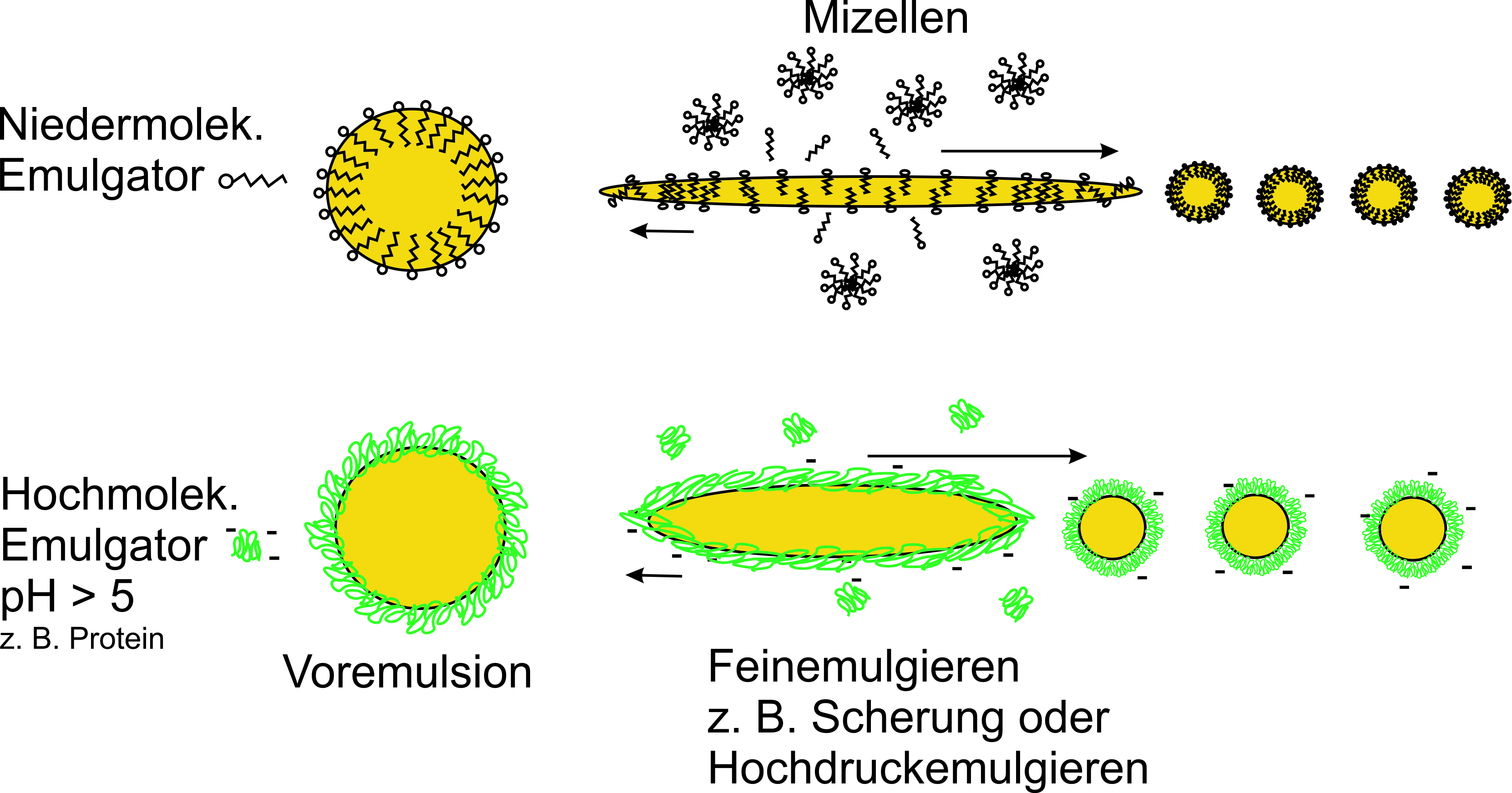 Beschreibung unverändert